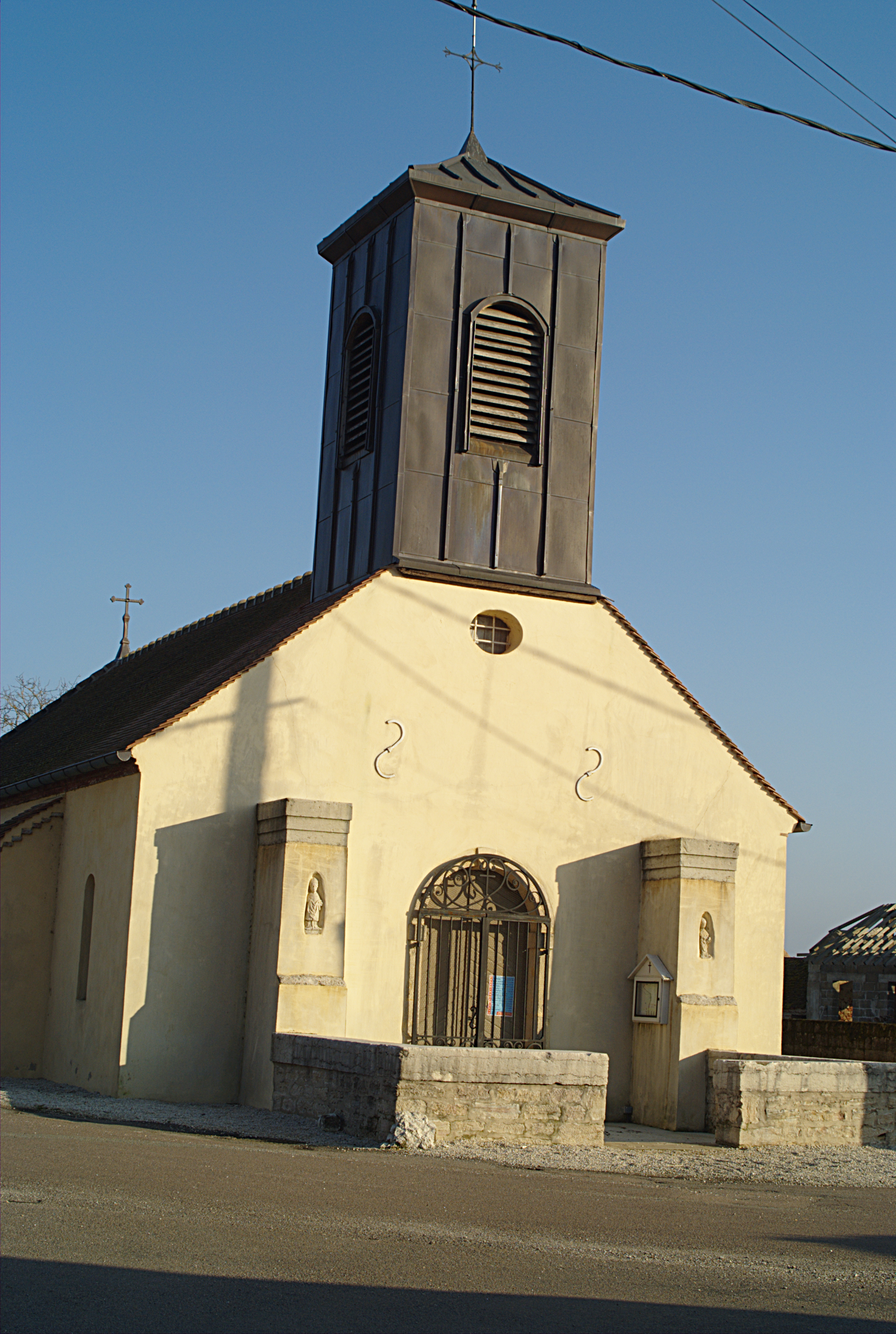 Église paroissiale Saint-Jean-Baptiste, Lechâtelet (Côte d'Or, Bourgogne, France)